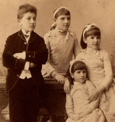 Maleczky Vilmos operaénekes és Ellinger Jozefa gyermekei. A középső lány Maleczky Bianka.